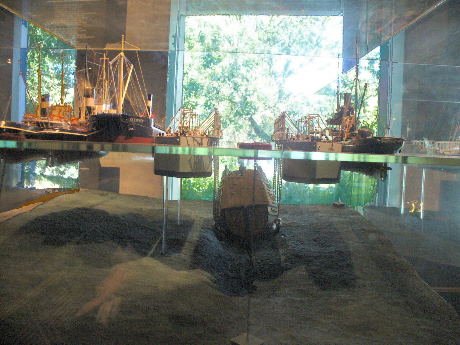 A Vasa hajó kiemelése, makett. Vasa múzeum, Stockholm. Sajat digitalis kamera.--Math 2005. október 19., 14:51 (CEST) hivatkozando forras: Brendel Matyas